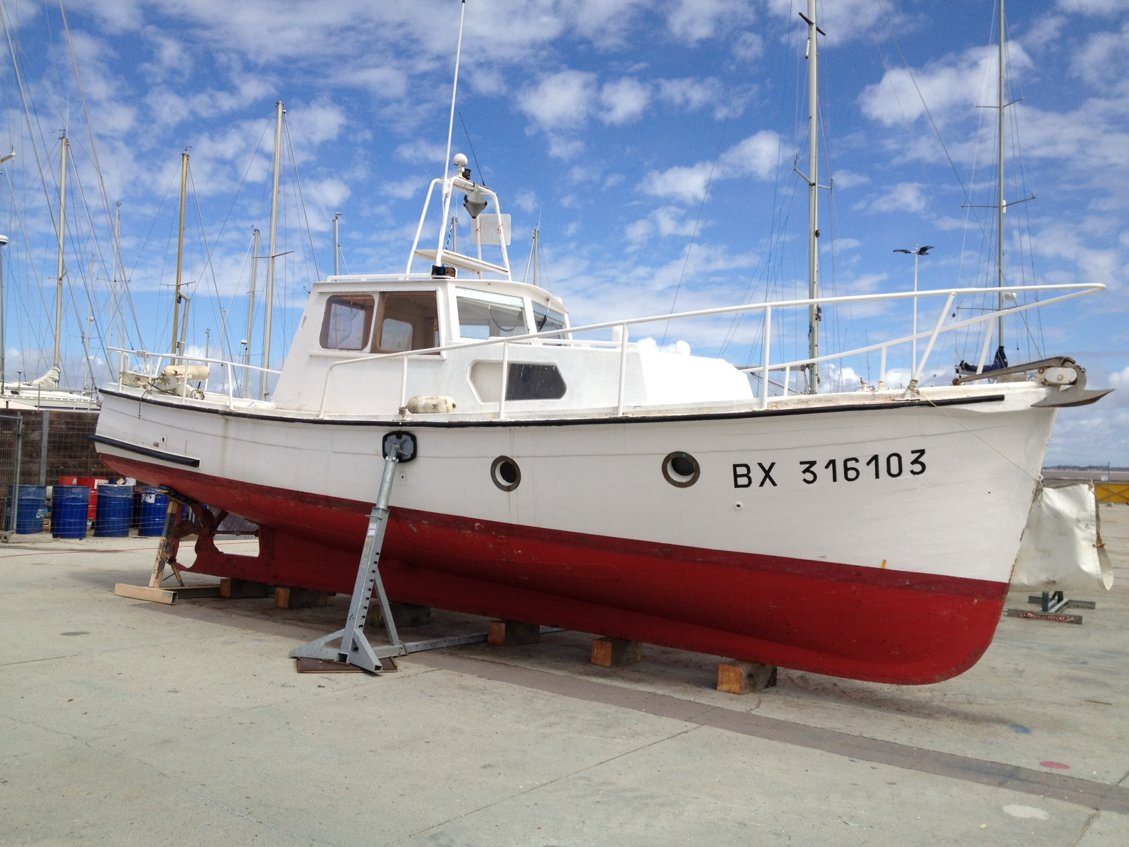 Bateau pilote Pilotine Trait-d'union du port de Royan propriétaire actuel Stephane Belgrand Rousson construction 1948 restauration en cours